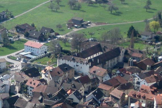 Schloss Haldenstein, von Lichtenstein aus gesehen